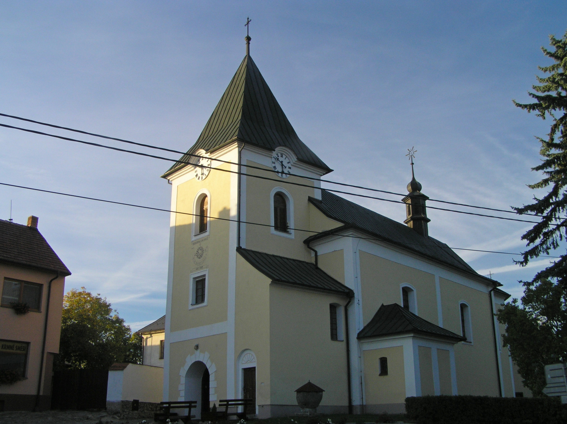 Kostel sv. Mikuláše v Heřmanově